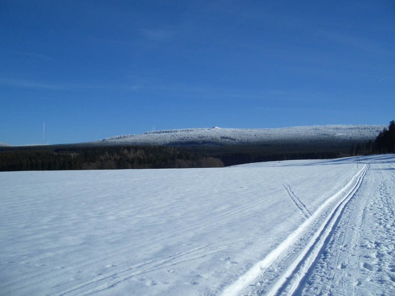 Die Wolfswarte im Harz.